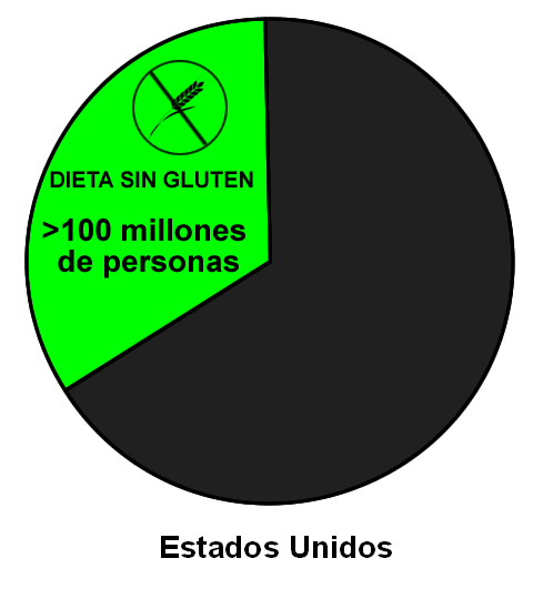 Número de personas que evitan comer gluten en EEUU